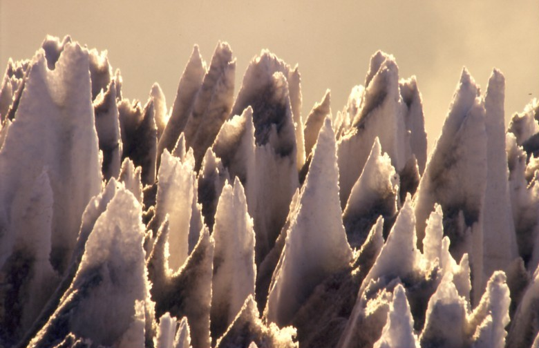 Meterhohe Eiszacken in der Gipfelregion des Damawand